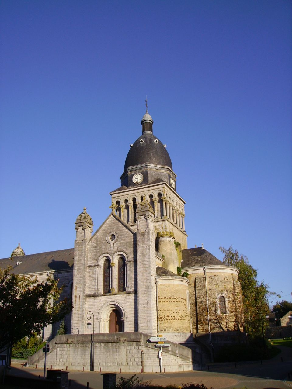 Eglise de Bouère (Mayenne, France)